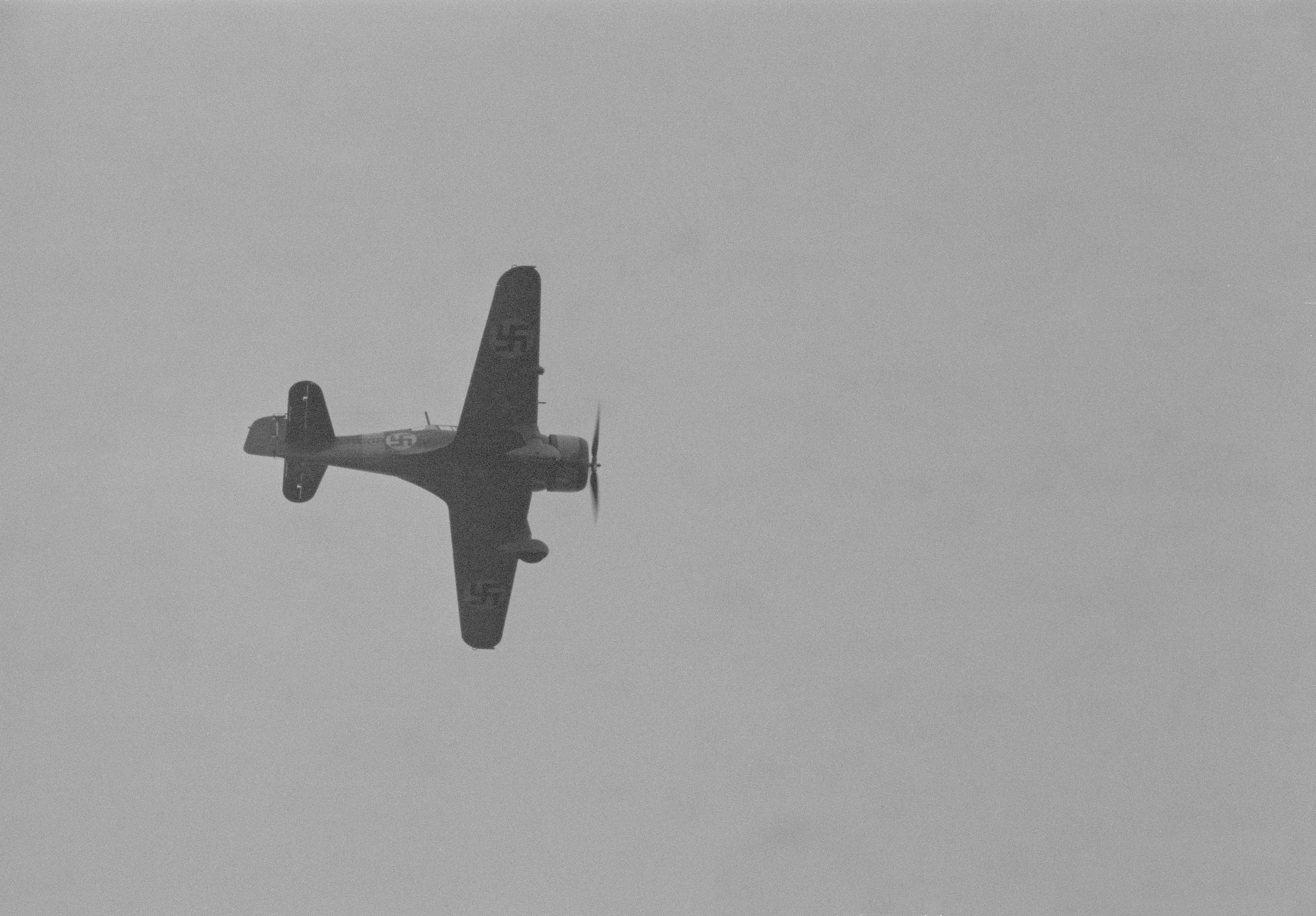 Fr-koneita ilmassa. (Kuvassa on Fokker D.XXI). Kuvauspaikka: Aunuksen kannas. LeLv 12 ja 36